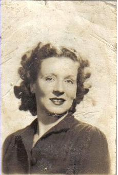 Aviadora Susana Ferrari Billinghurst